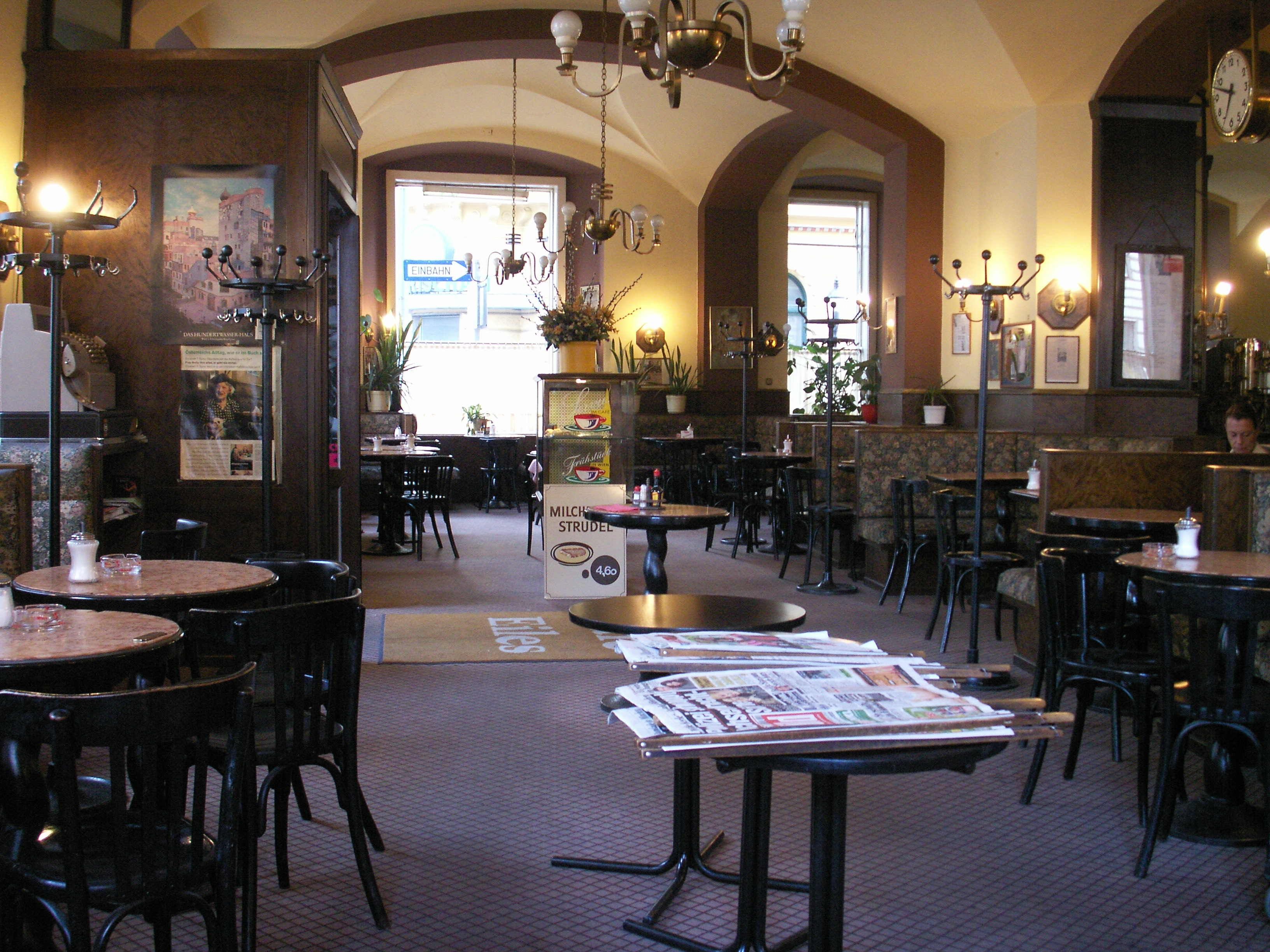 Café Eiles Josefstädter Straße 2, Wien